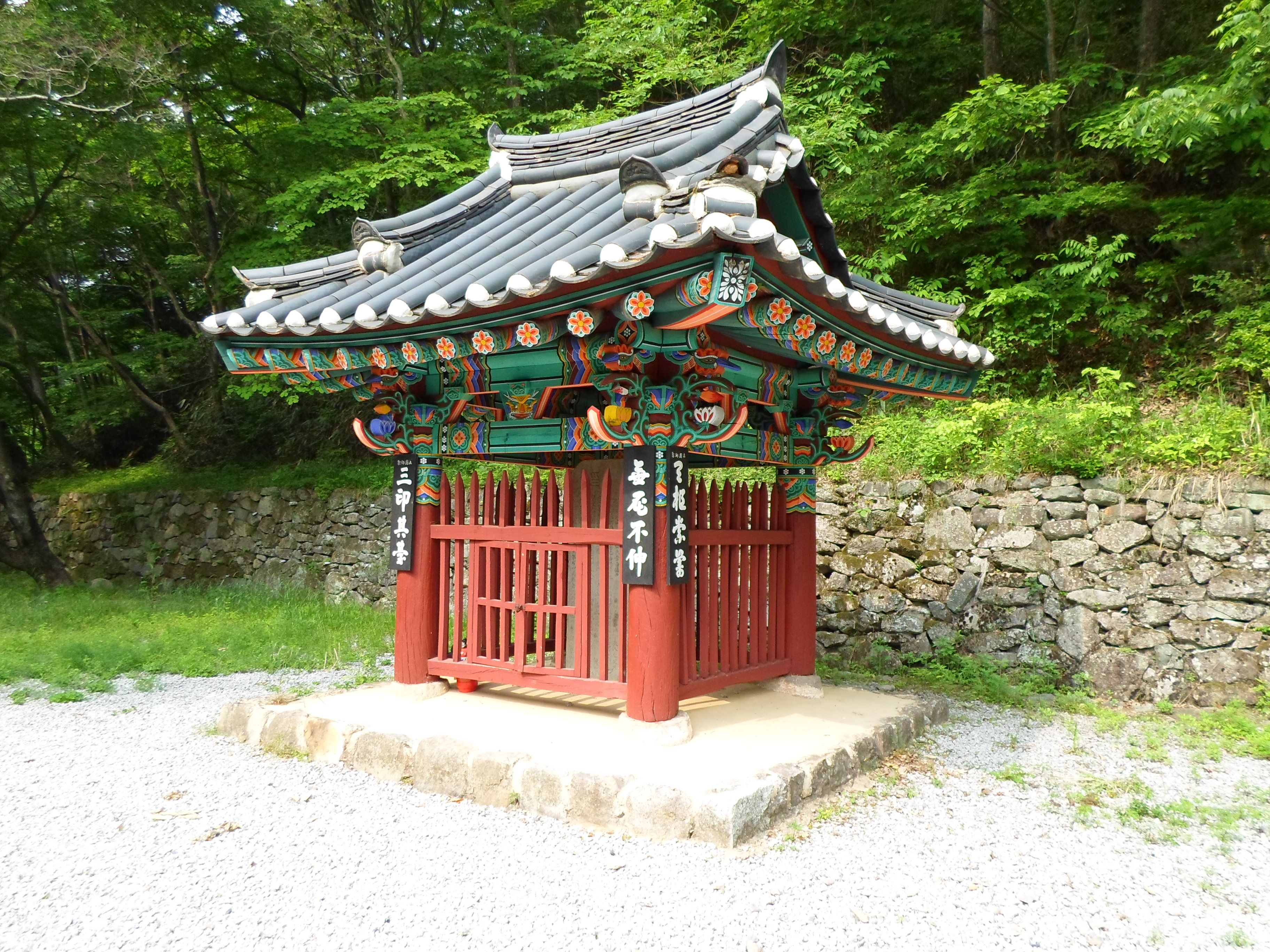 전라북도 유형문화제 제27호 순창 삼인대(三印臺).